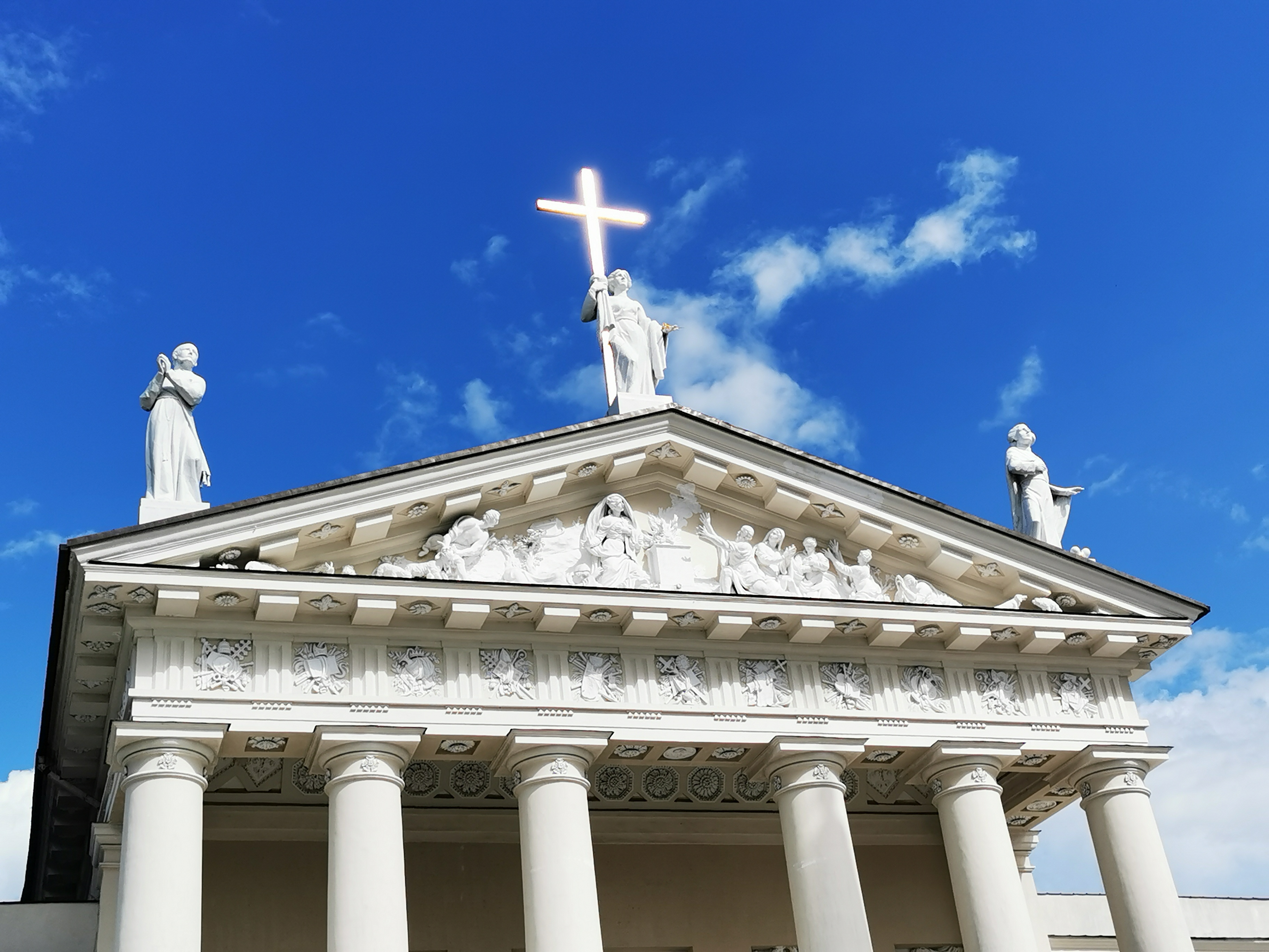 Katedros skulptūros